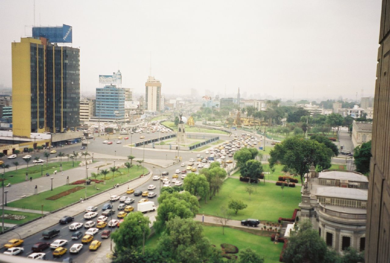 Busy street in Lima PeruPaseo de la República Lima